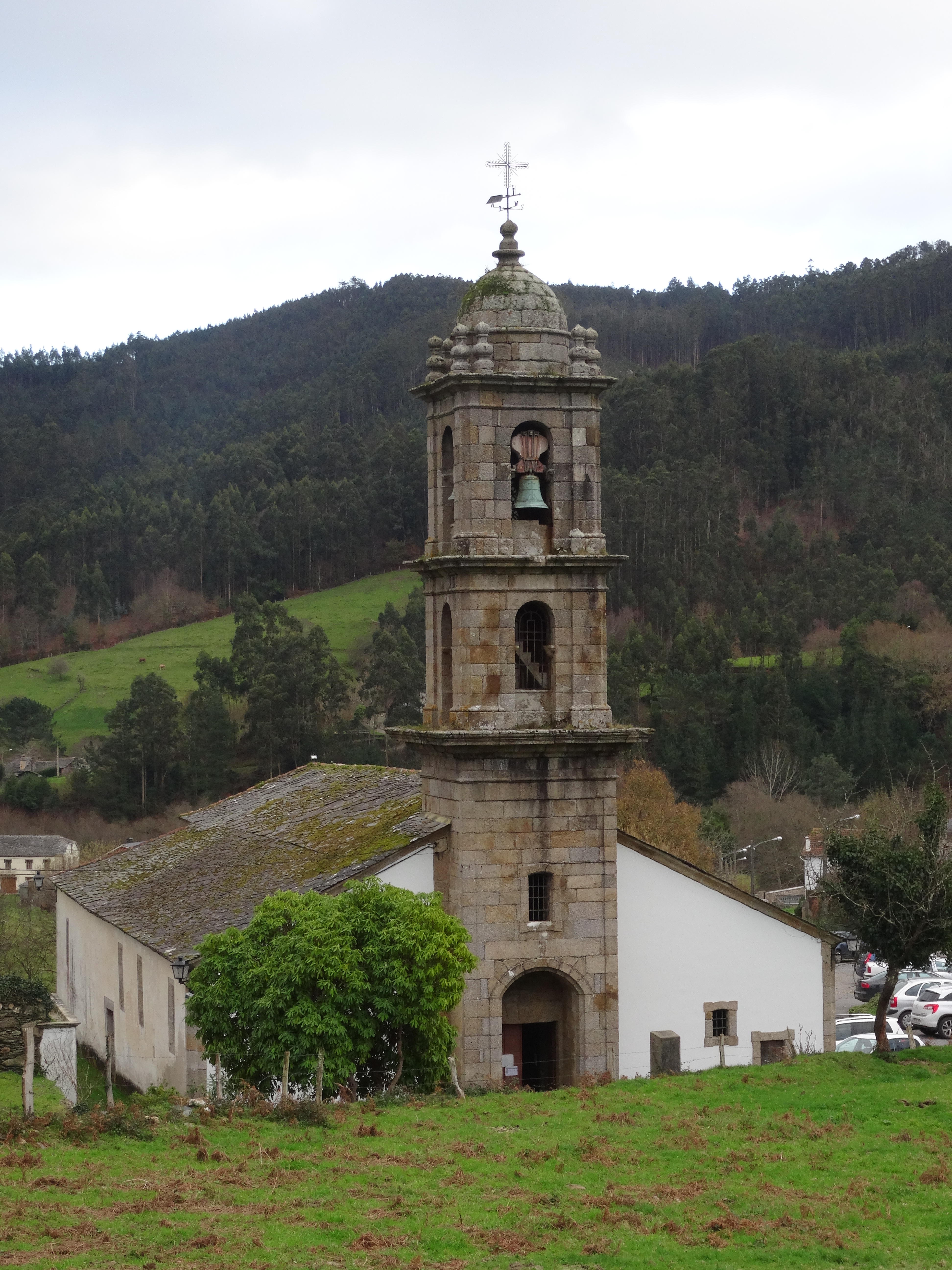 Ver título.